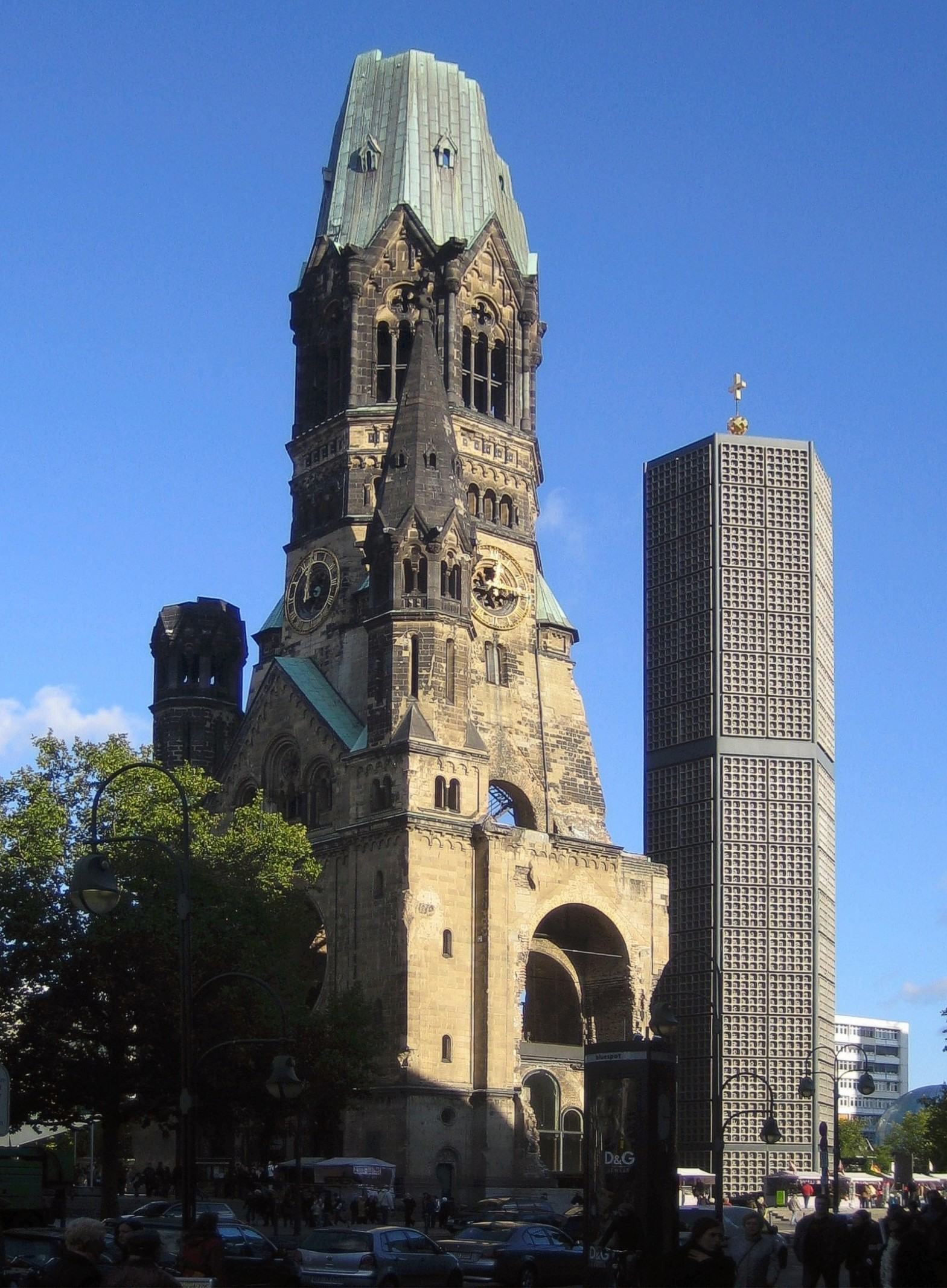 Berlin.The "Kaiser-Wilhelm-Gedächtniskirche", total view.